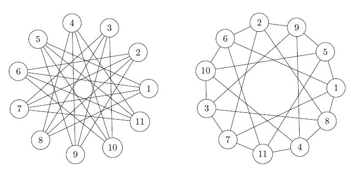 Andrásfai-gráf n=4-re